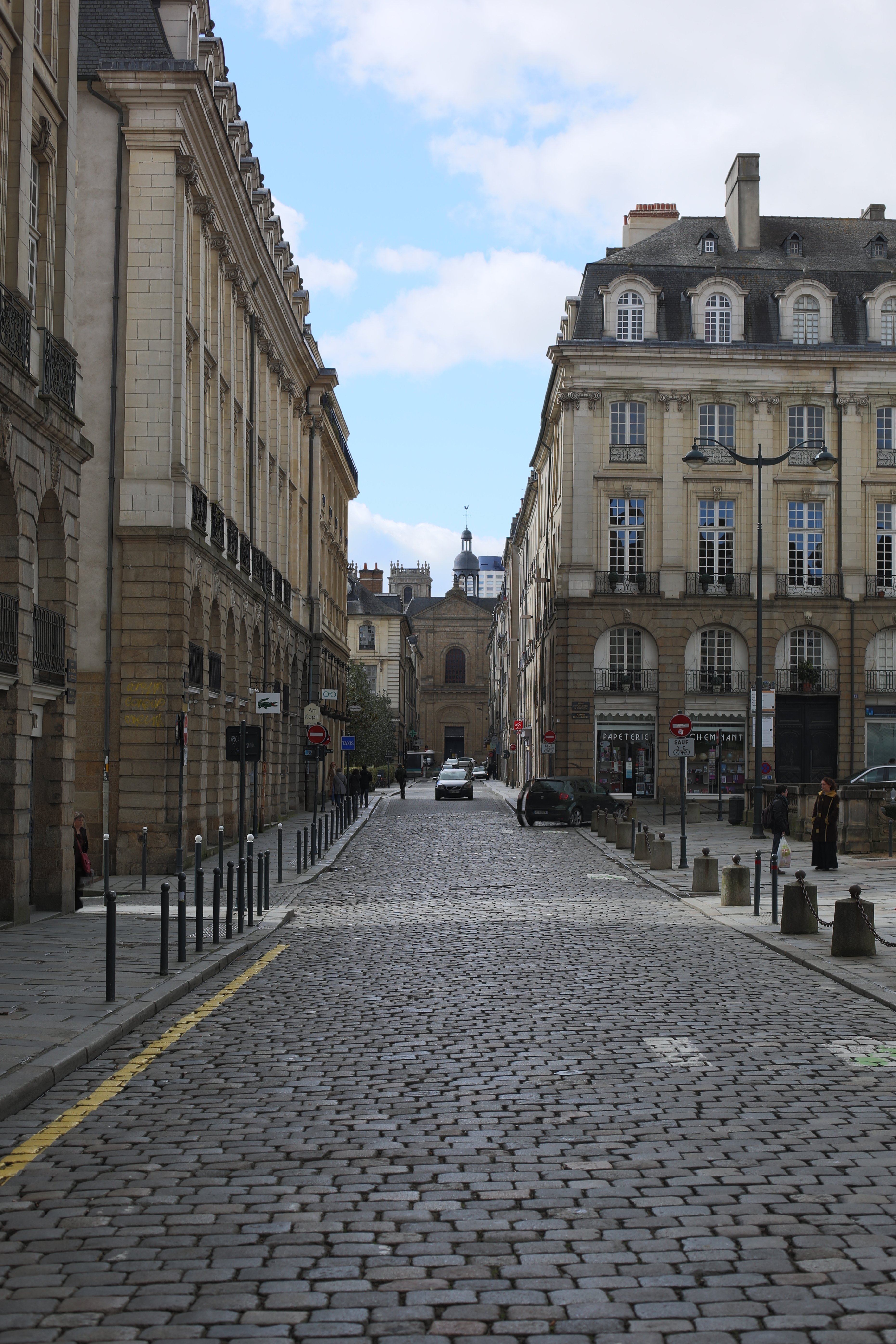 Perspective formée par les rues de Brilhac, de l'Hermine et Du Guesclin à Rennes, entre le Parlement de Bretagne et la basilique Saint-Sauveur.